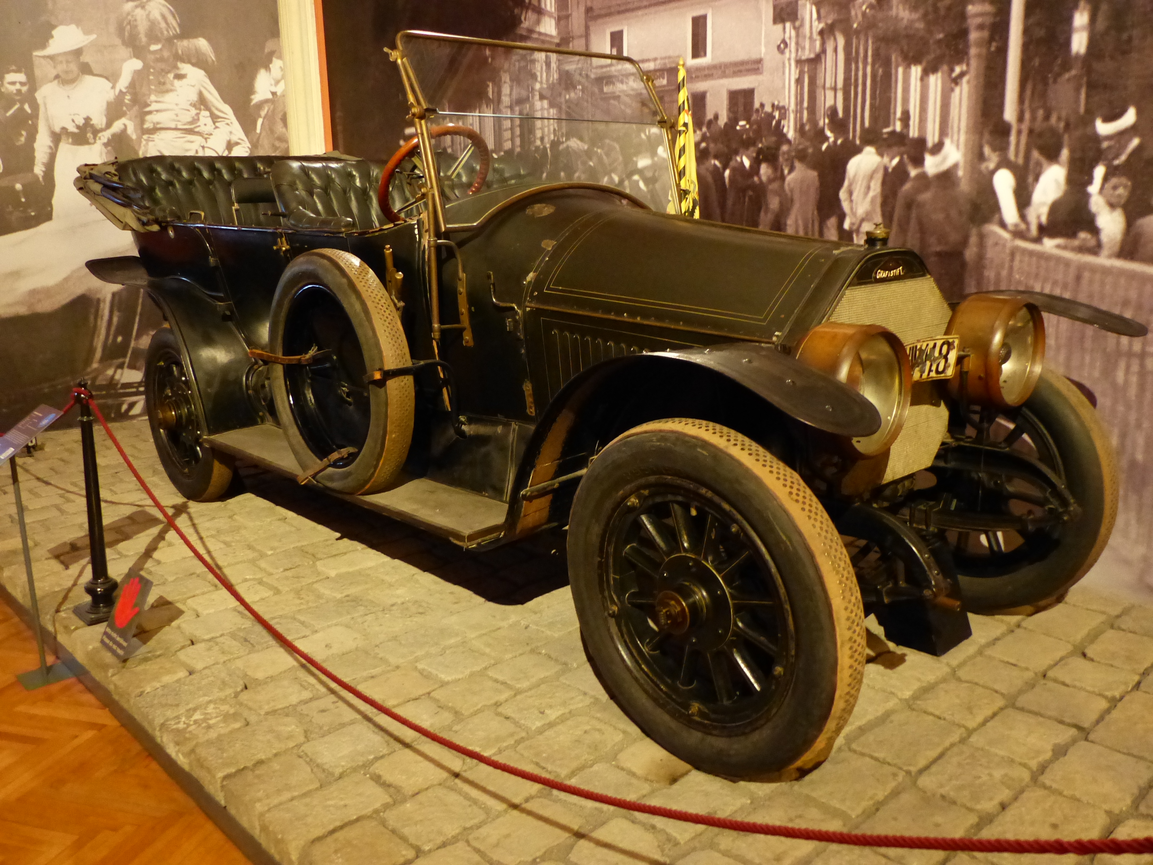 Gräf & Stift Automobil im Heeresgeschichtlichen Museum in Wien, mit dem Thronfolger Franz Ferdiand in Sarajevo unterwegs war